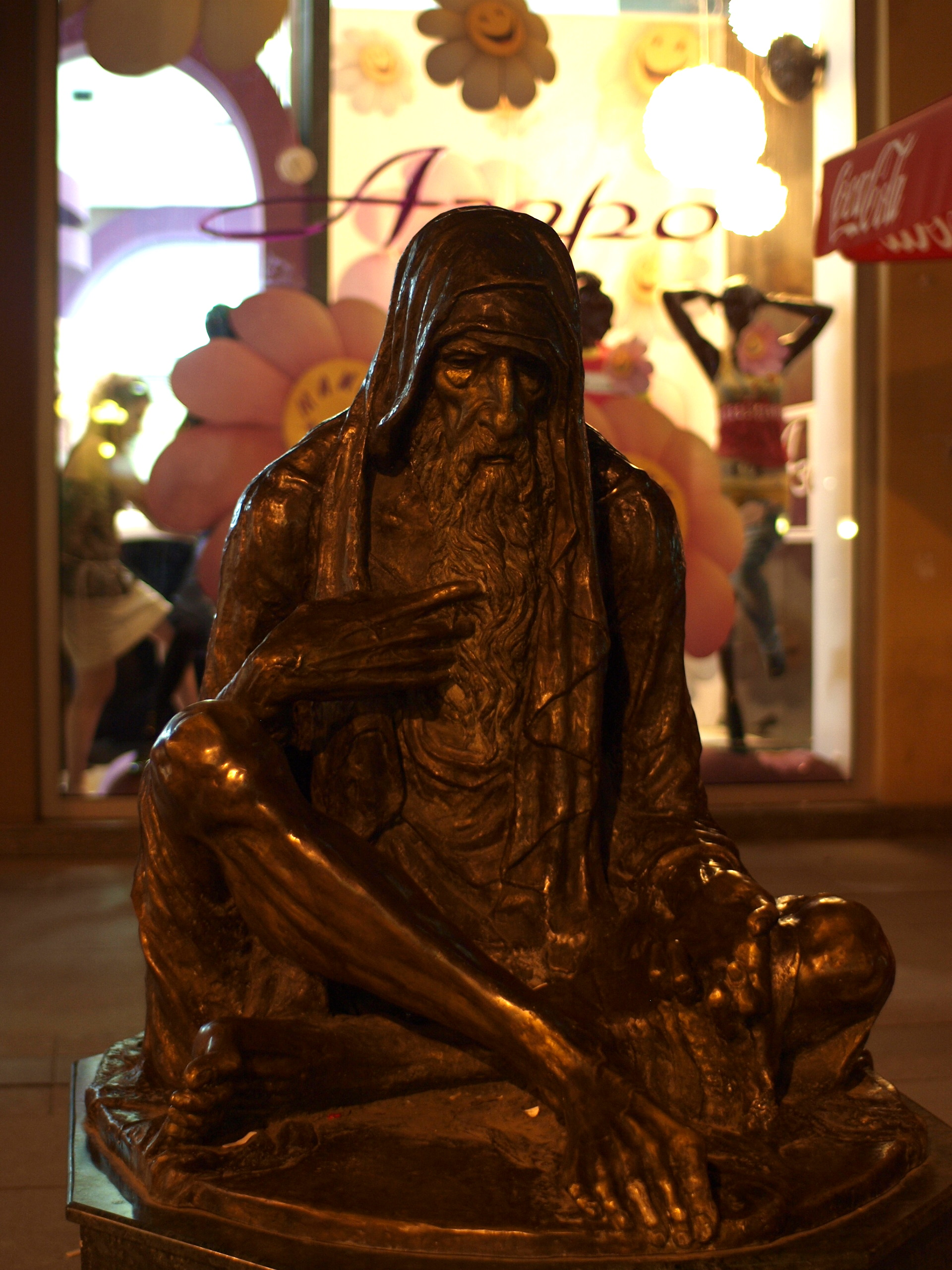 Prosjakot....Skopje, Macedonia